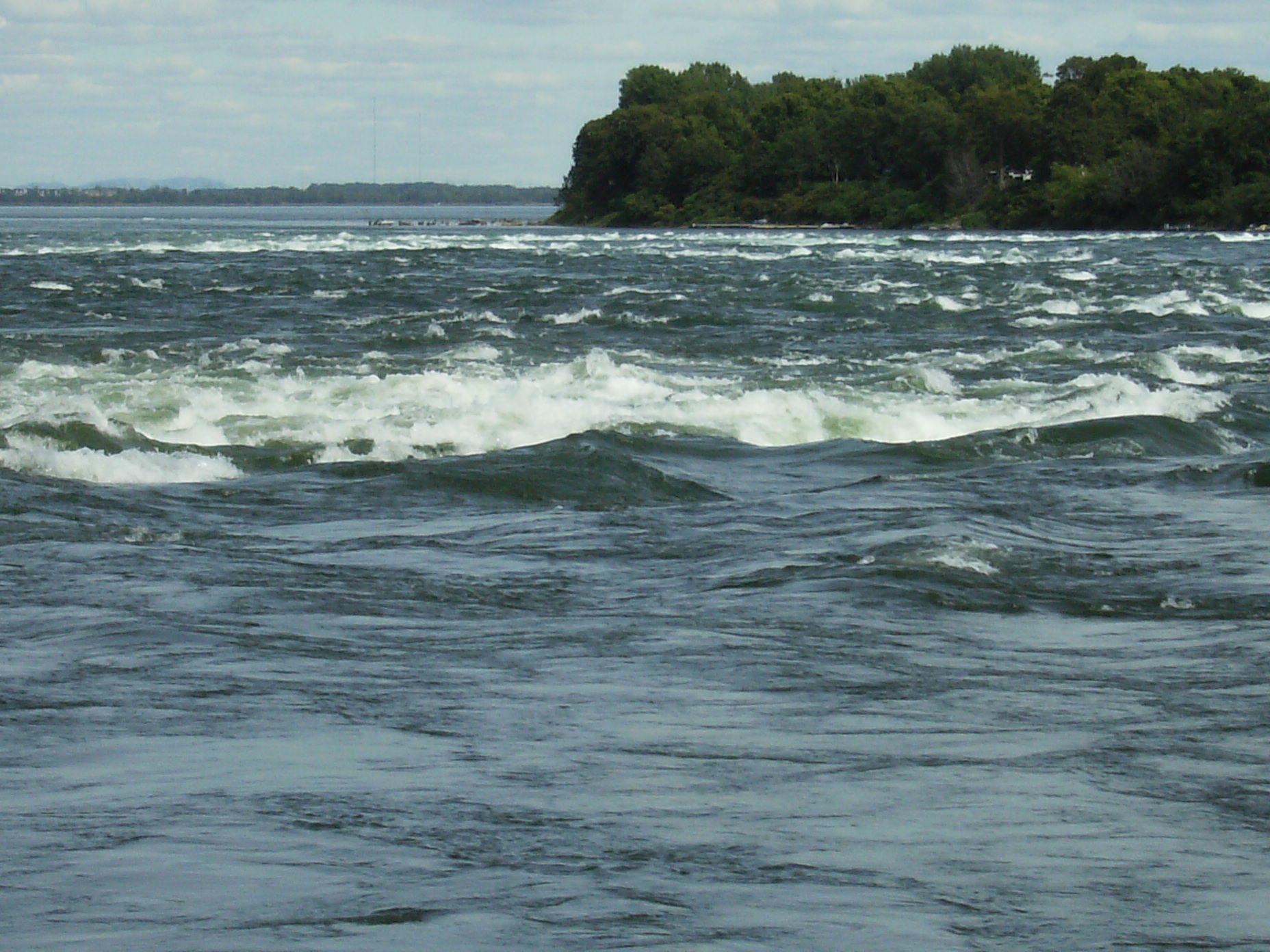 rapides de Lachine Saint Laurent près de Montreal